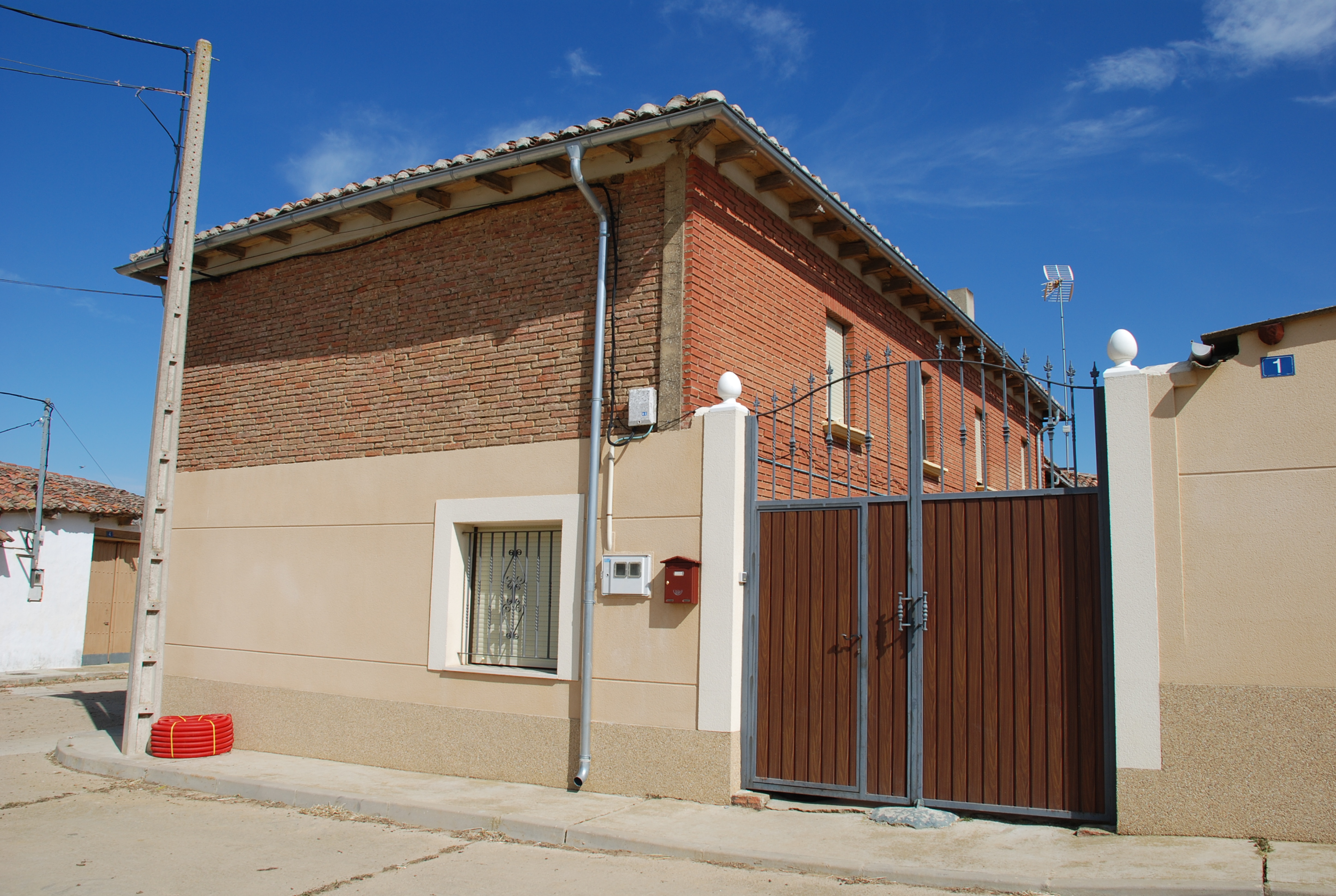 Casa natal del Padre Lucas Espinosa sita en la calle Chirona Nº1, en Villabasta de Valdavia (provincia de Palencia, España)